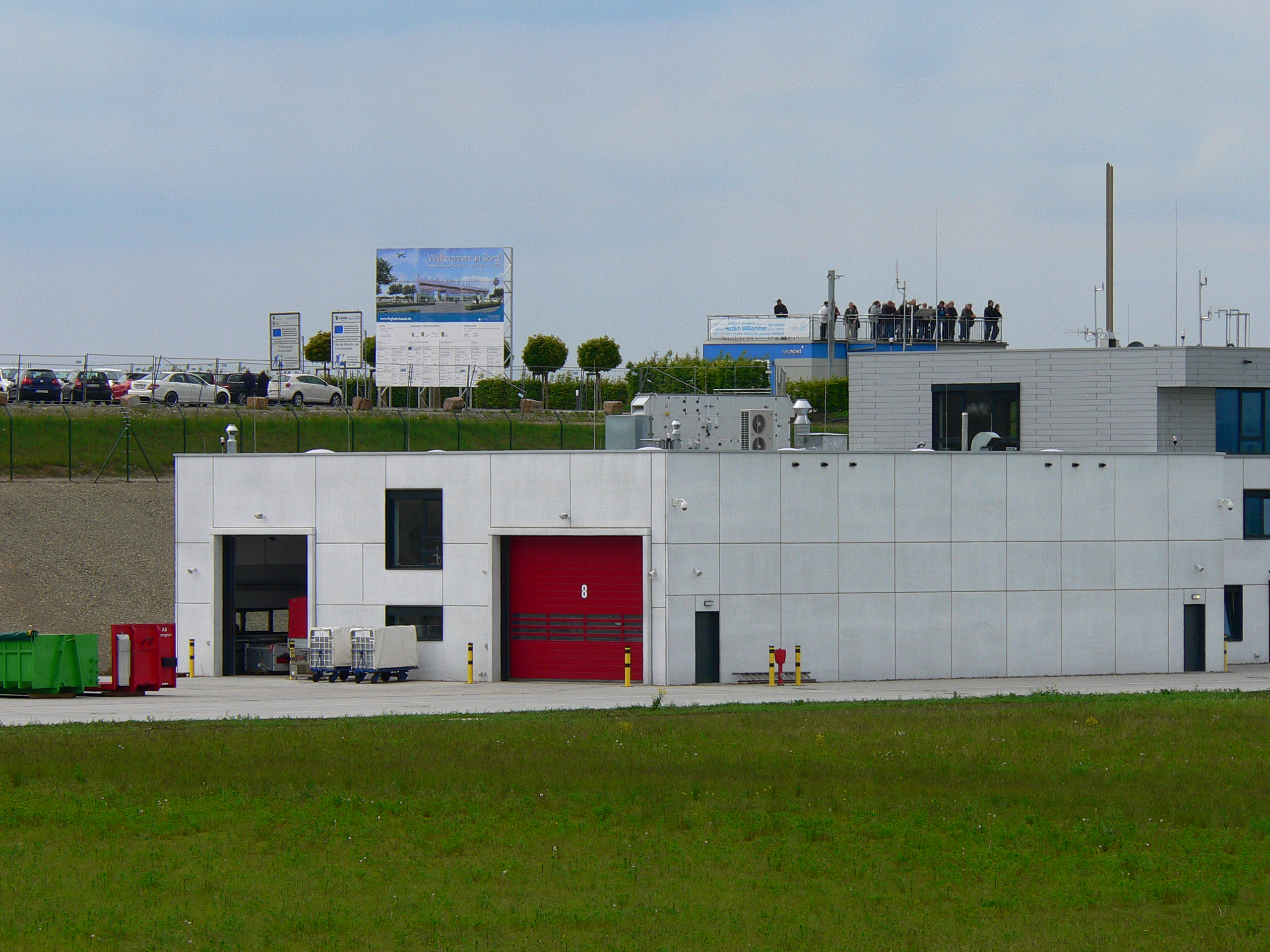 Flughafen Kassel-Calden, Feuerwehrstützpunkt und Besucherplattform (Info-Point)